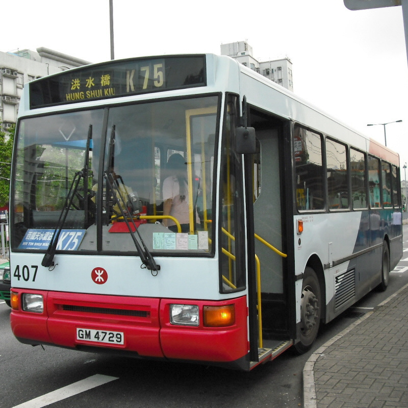 港鐵巴士K75線，攝於洪水橋輕鐵站對出巴士站